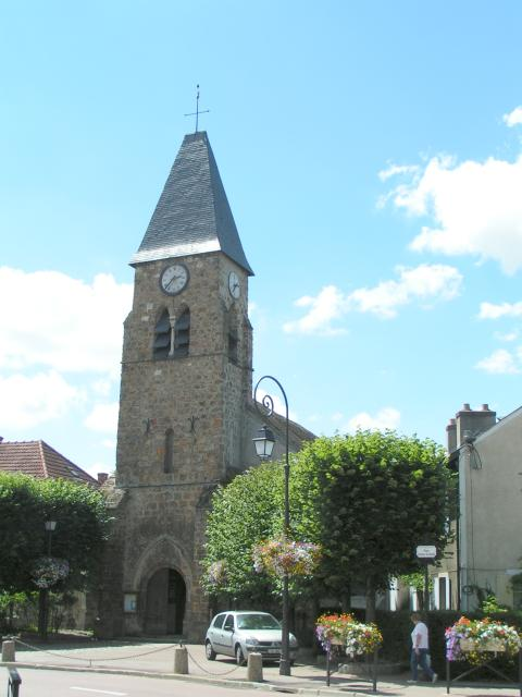 Description: église de Saint-Rémy-lès-Chevreuse Source: photo prise par Christophe Jacquet le 16 juillet 2004 Licence: Christophe Jacquet, 2004